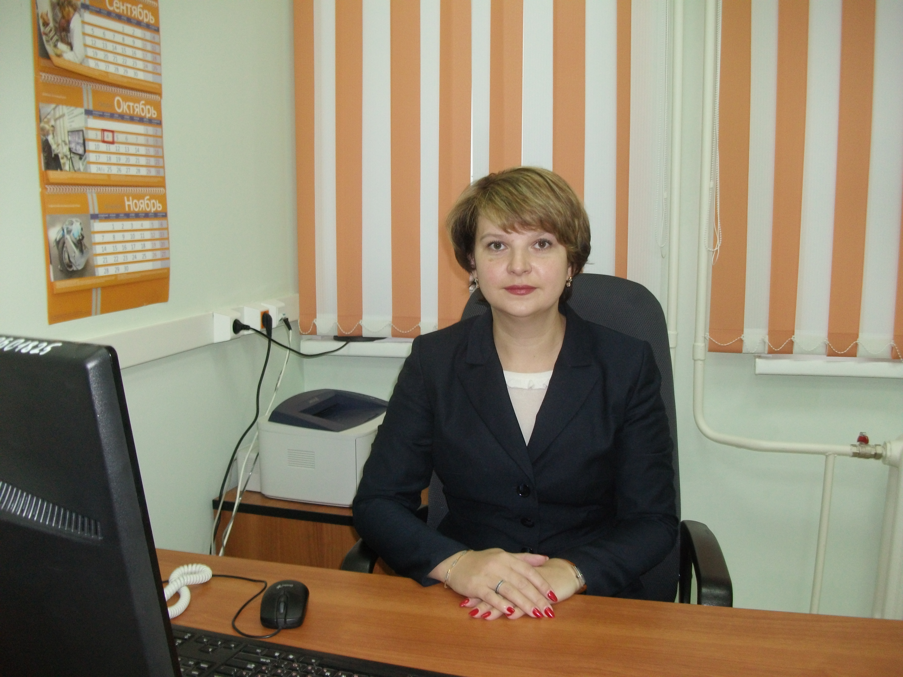 Матовкина Ирина Викторовна - Заместитель главного врача по экономическим вопросам в Томском Областном Перинатальном Центре